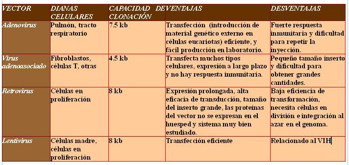 Resumen de las ventajas e inconvenientes de los principales vectores víricos utilizados en la terapia génica